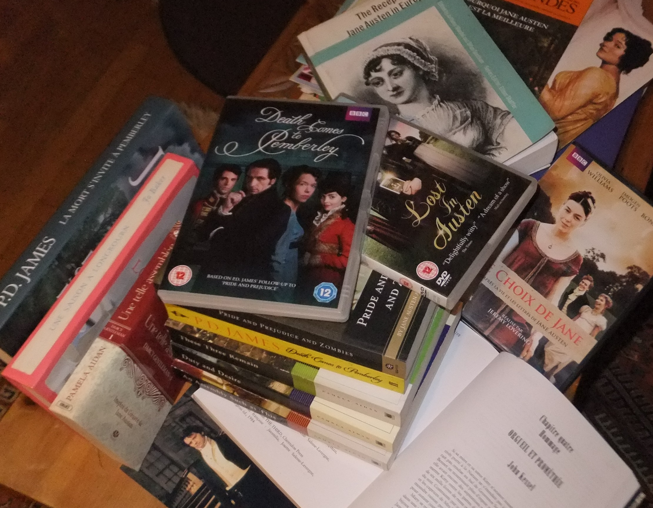 Empilement de livres et DVD dérivés de l'œuvre de Jane Austen